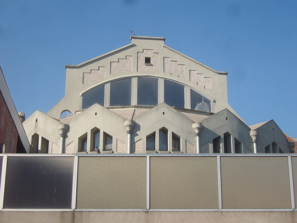 Paris 13e arrondissement - Piscine de la Butte-aux-Cailles - vue arrière sur la rue du Moulinet